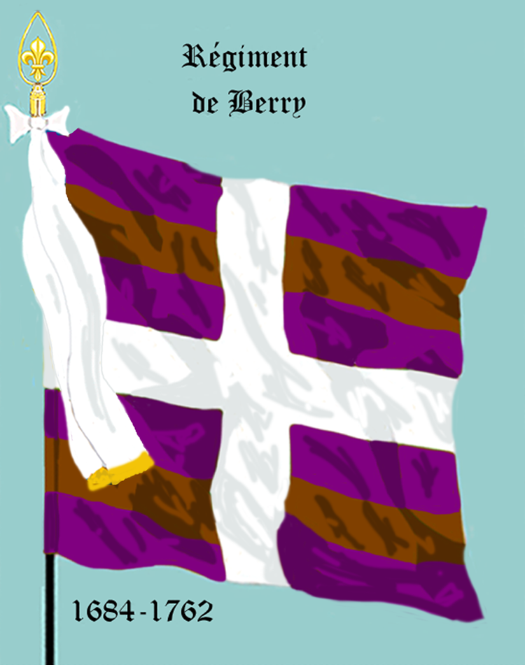 Ordonnanzfahne eines königlich französischen Infanterie-Regiments. - Entnommen und überarbeitet aus: „LES UNIFORMES ET LES DRAPEAUX DE L'ARMÉE DU ROI“ Marseille 1899. (Drapeau d'Ordonnance d' un régiment française d'infanterie royale.)